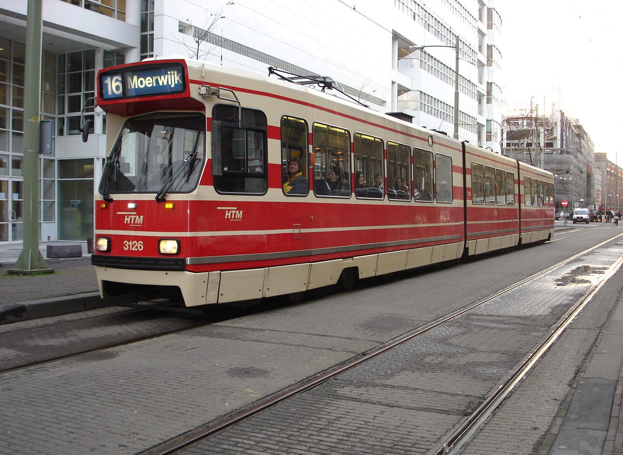 Achtassige gelede tram, Den Haag.